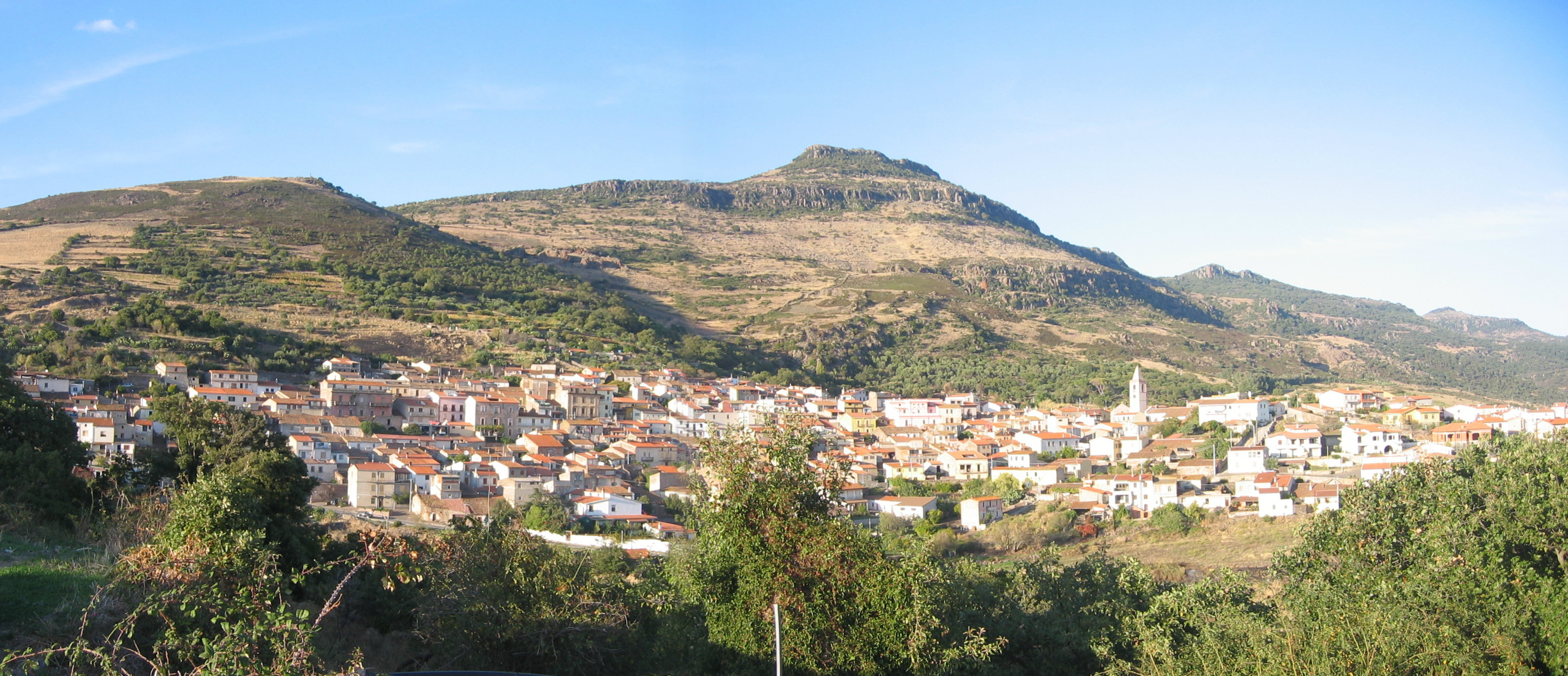 Panorama del centro abitato di Bortigali (Nu)